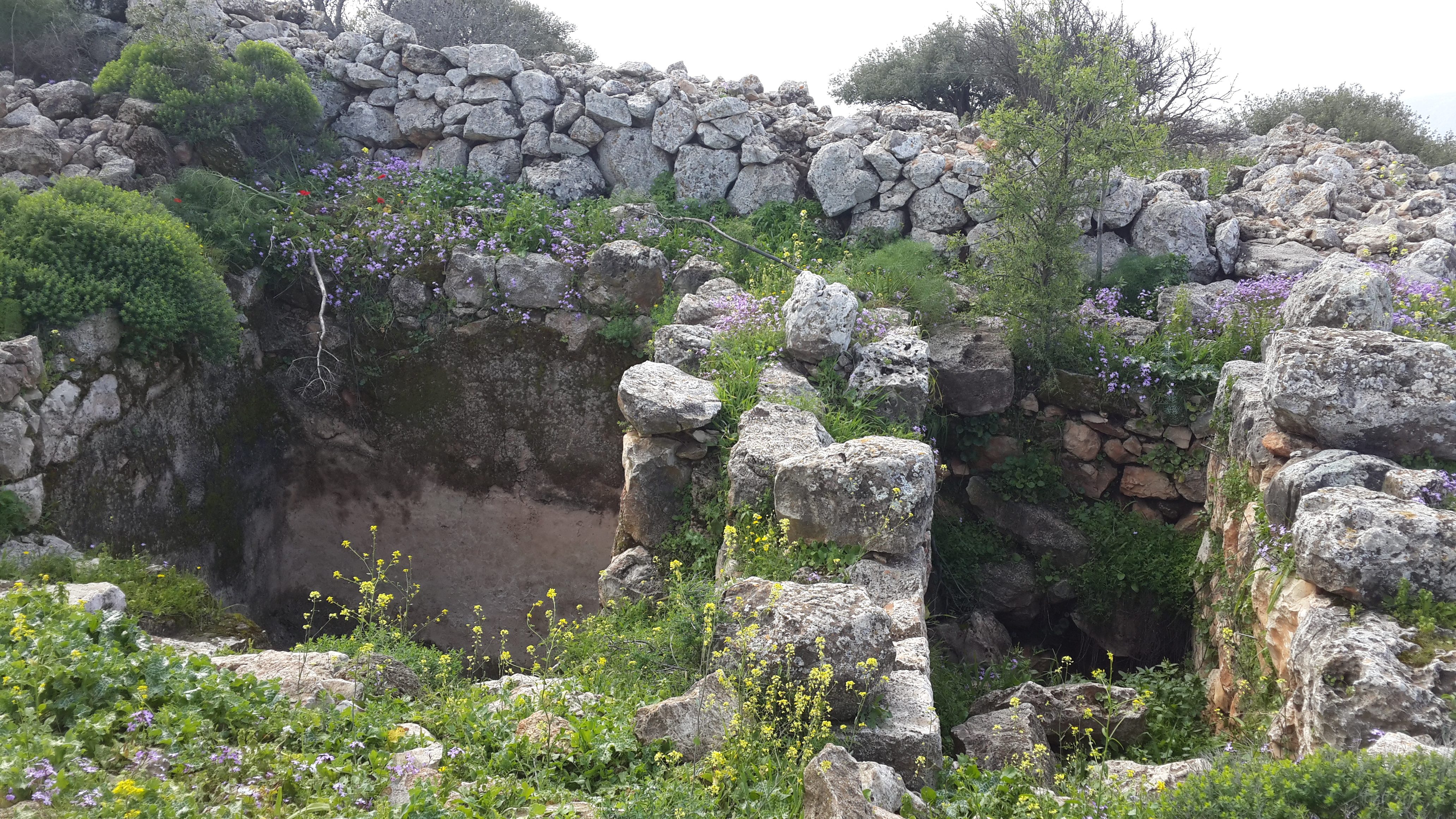 מצודת קרן נפתלי, מקווה